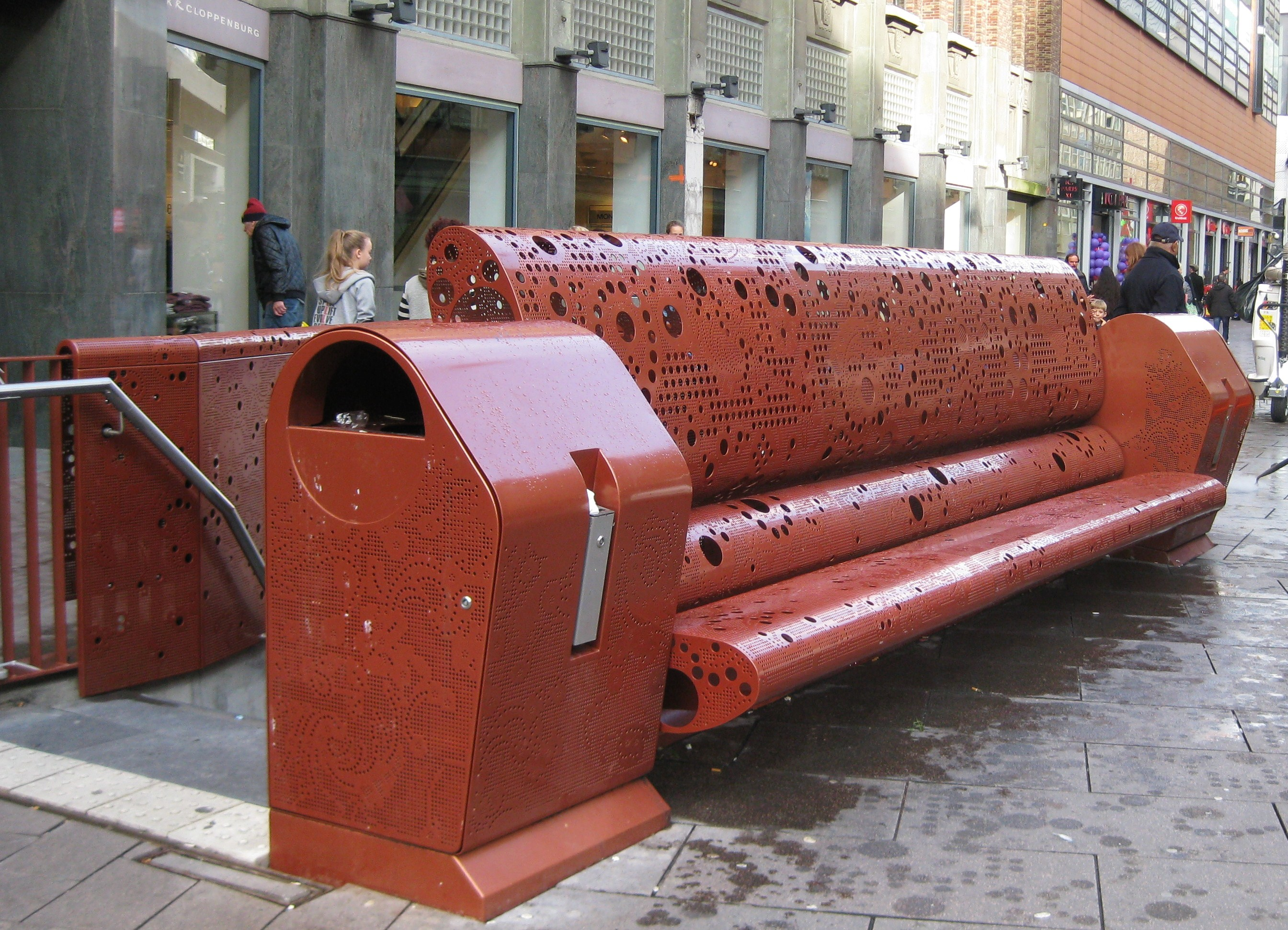 Straatmeubilair Grote Markstraat, Den Haag. Ontworpen door Lana du Croq. 2014